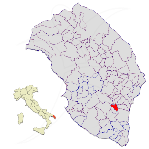 Il territorio del comune di Montesano Salentino in provincia di Lecce